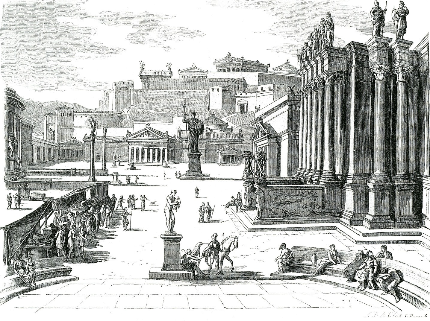 Ιάκωβος Φάλκε. Ελλάς, ο Βίος των Αρχαίων Ελλήνων. Κατά το γερμανικό του Ιακώβου Φάλκε, Ν. Γ. Πολίτης (μετ.), Αθήνα, Κάρολος Βίλμπεργκ, 1887